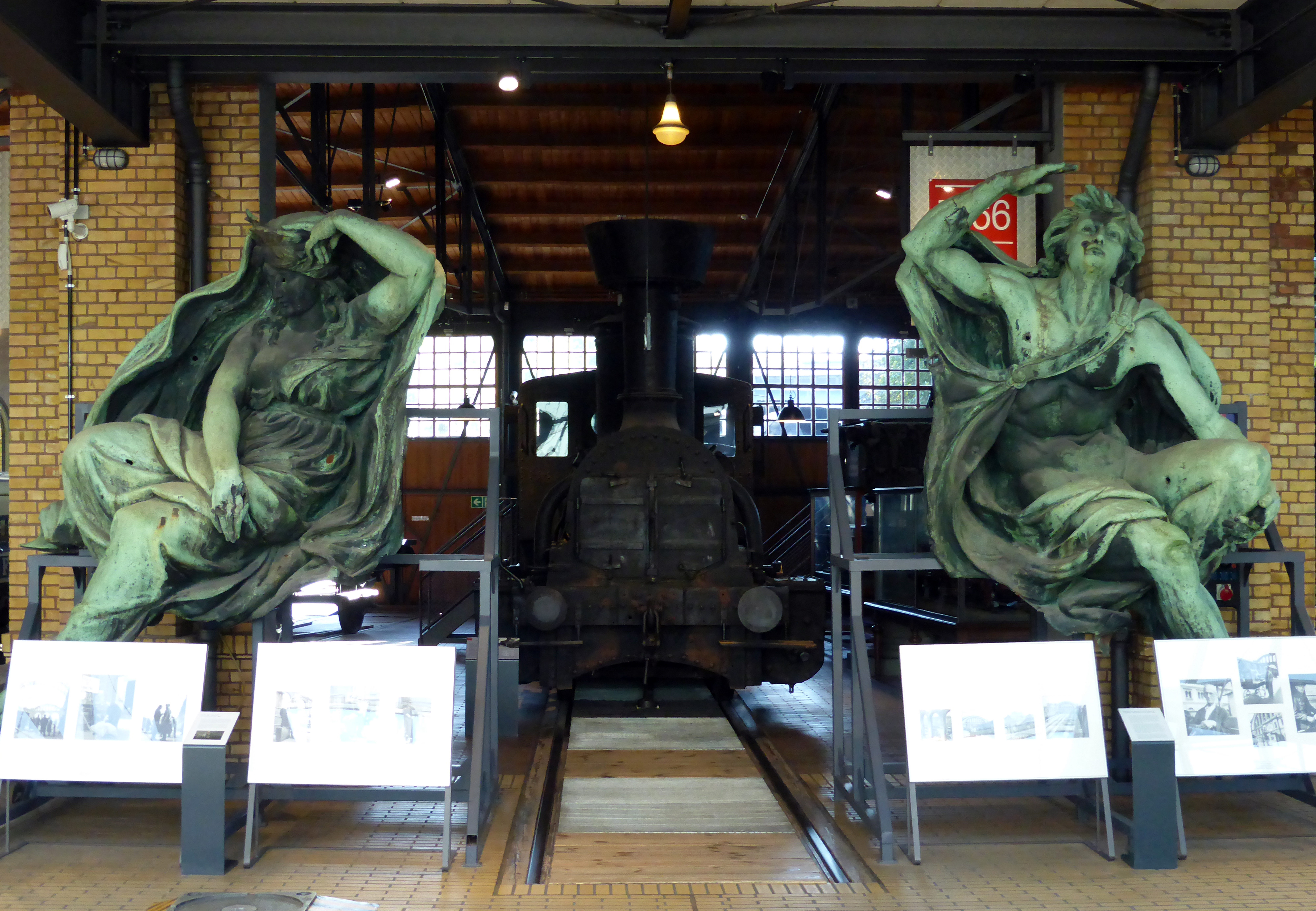 Figurengruppe Tag und Nacht. Galvanoplastik aus Kupfer vom Bildhauer Ludwig Brunow von 1880. Standen auf dem Anhalter Bahnhof (Berlin). Heute ausgestellt im Deutschen Technikmuseum Berlin. Wikipedianische KulTour am 10. Oktober 2015 in der Ausstellung des Museums.